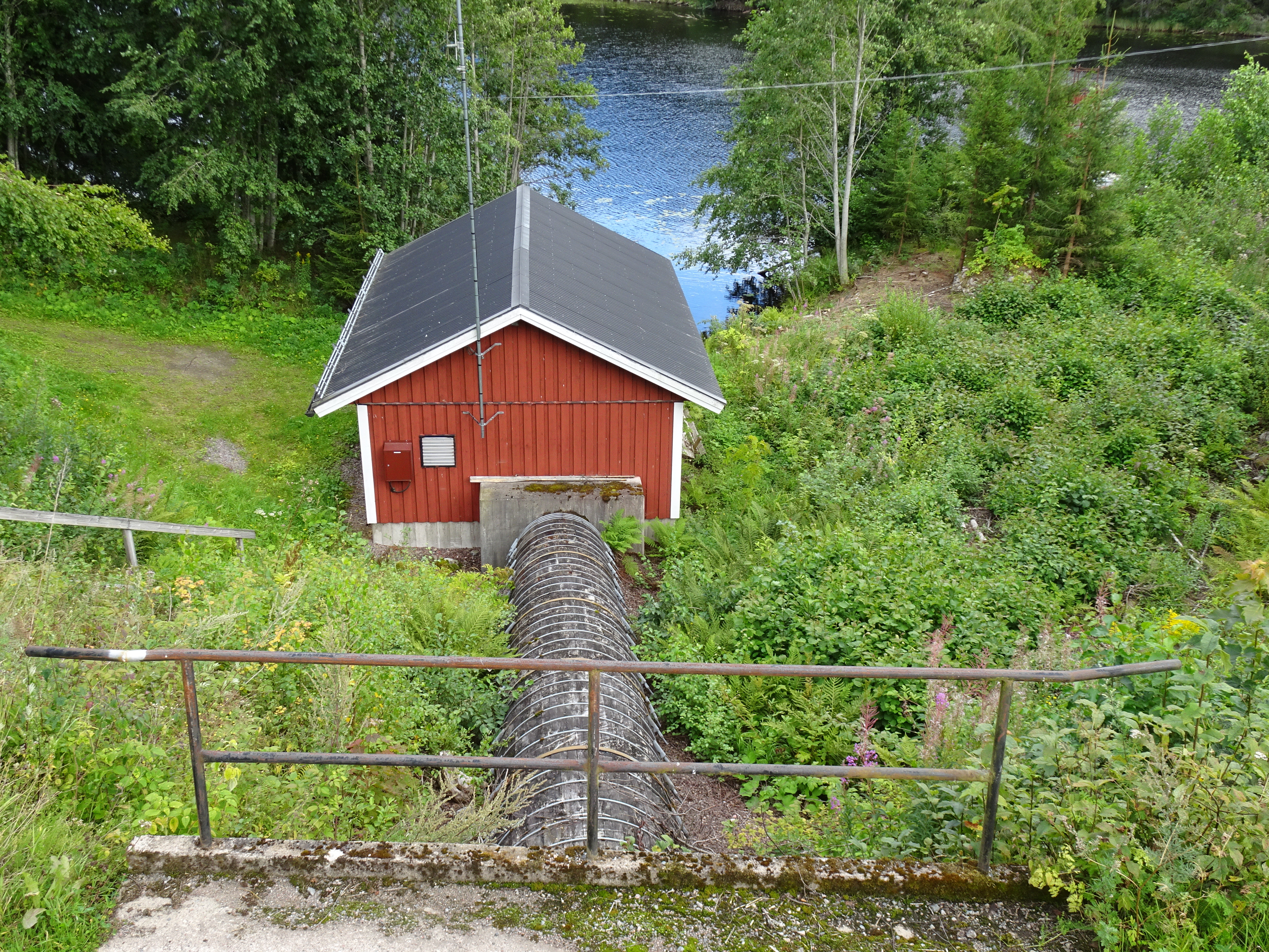 Bråfalls kraftverk